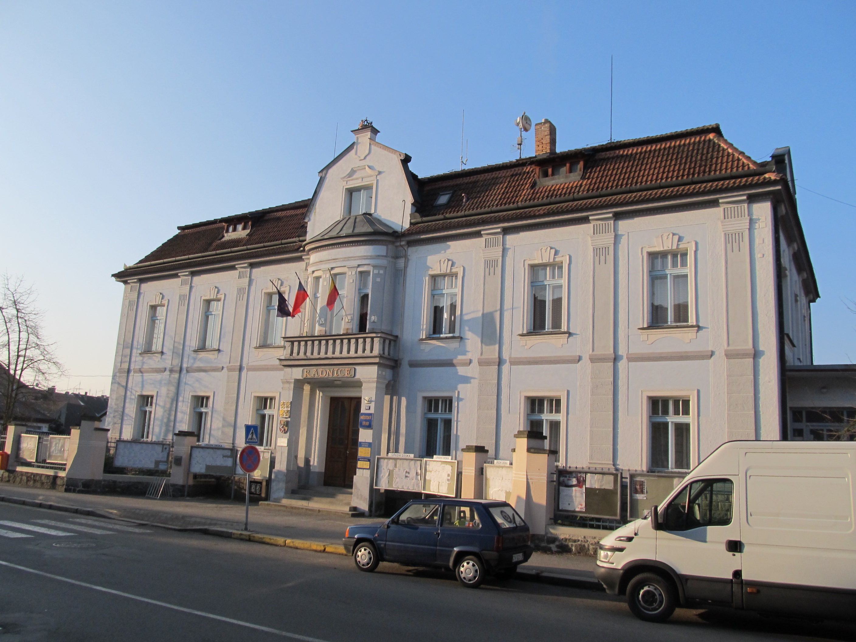 Blatná - radnice, tř. T. G. Masaryka 322.